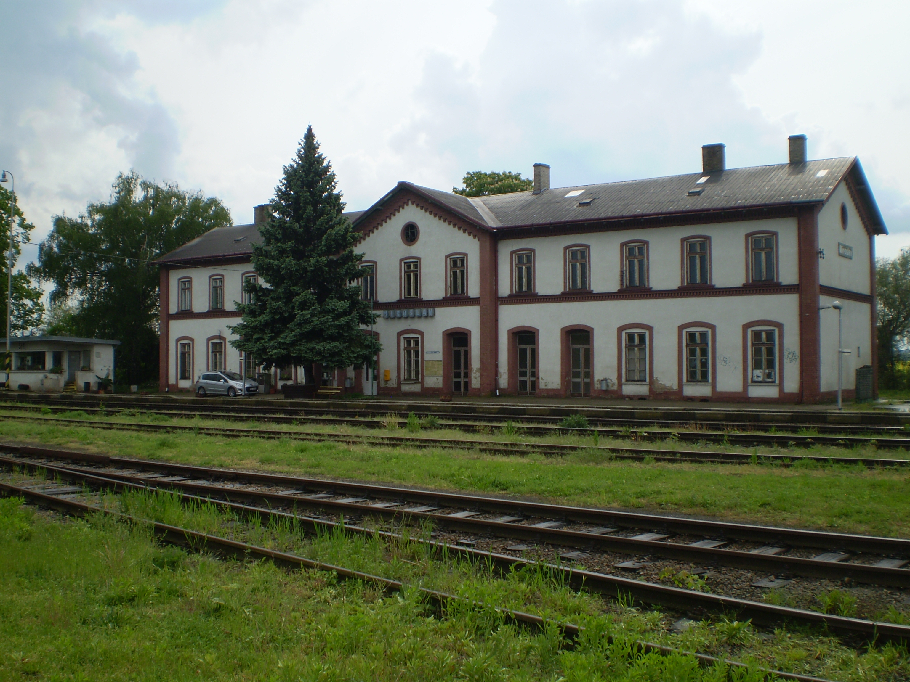 Pohled na budovu miroslavského vlakového nádraží z přední strany od kolejí.